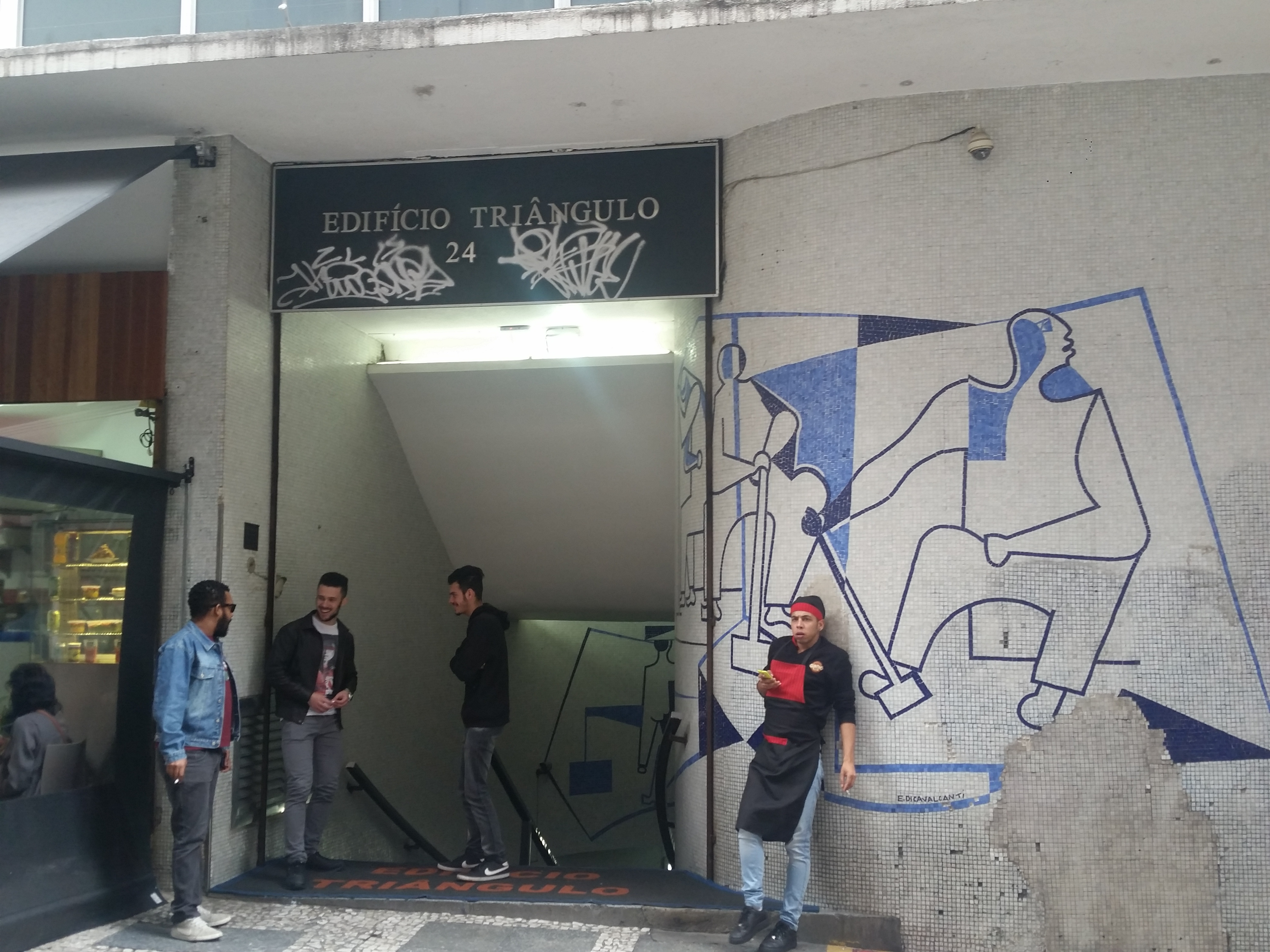 Entrada do Edifício Triângulo, com painel de Di Cavalcanti. São Paulo (SP), Brasil